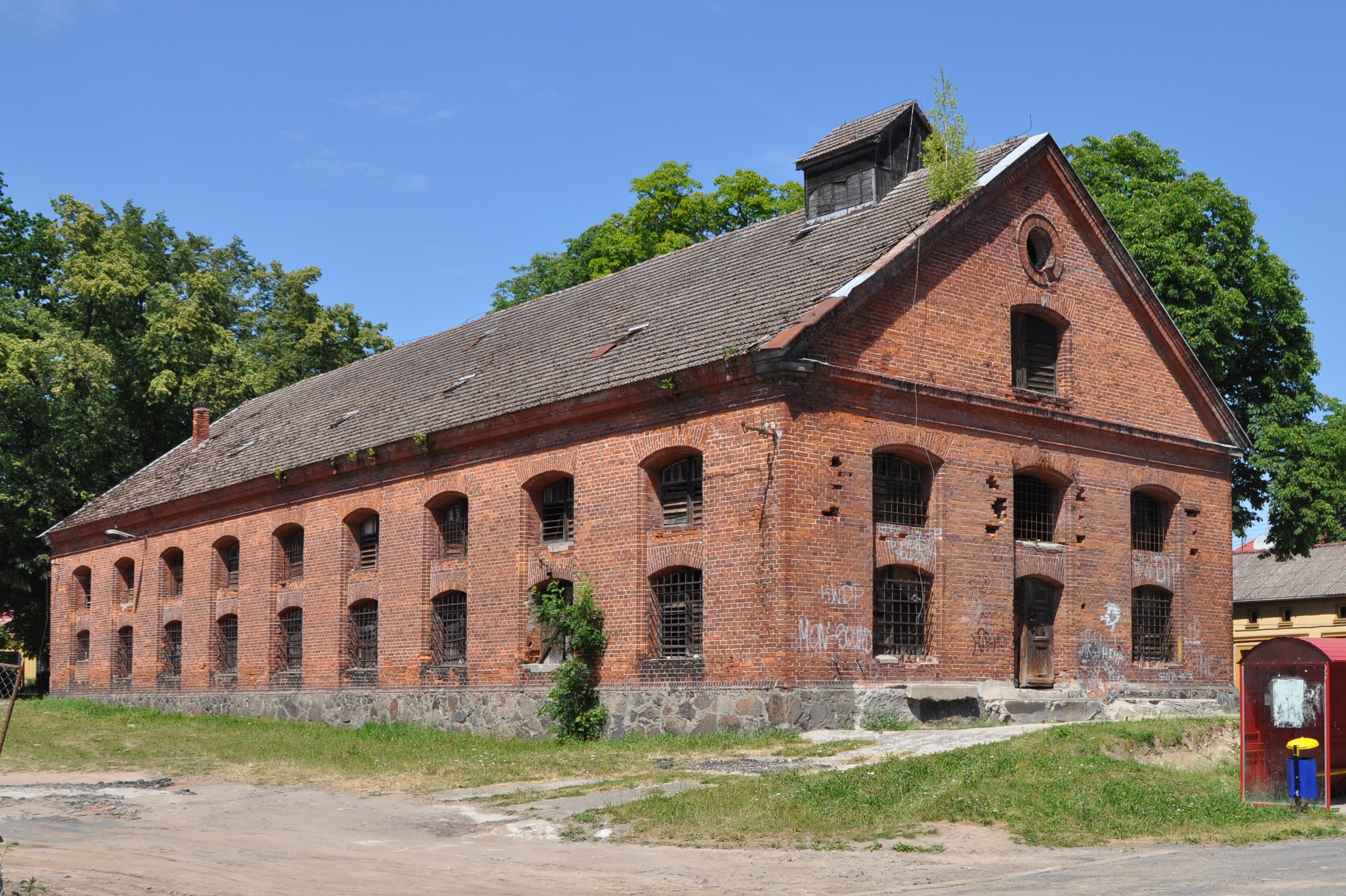 Spichrz przy placu Lipowym 28 w Trzebiatowie